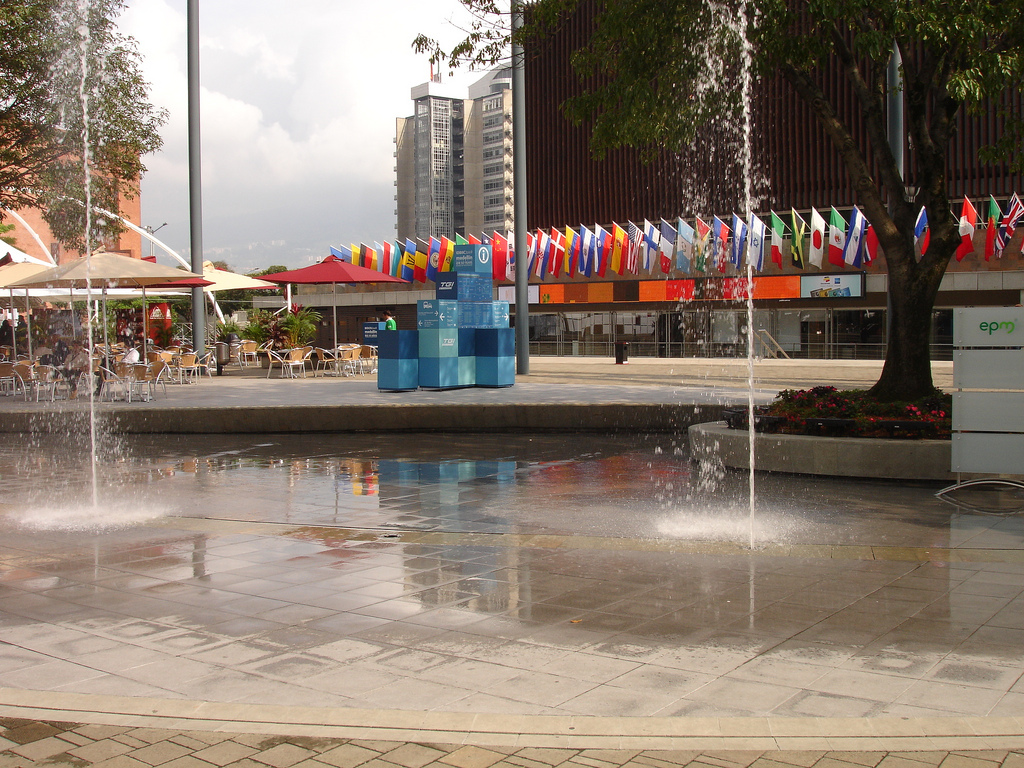 Edición 50 de la Asamblea Anual del Banco Interamericano de Desarrollo en Medellín, Colombia. Centro de Exposiciones y Convenciones.